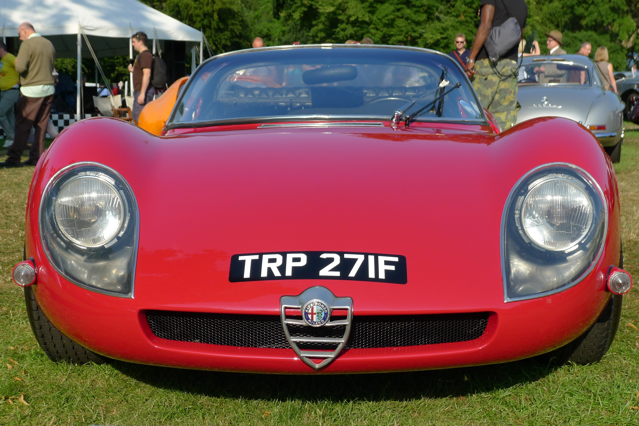 1968 Alfa Romeo Tipo 33 Stradale